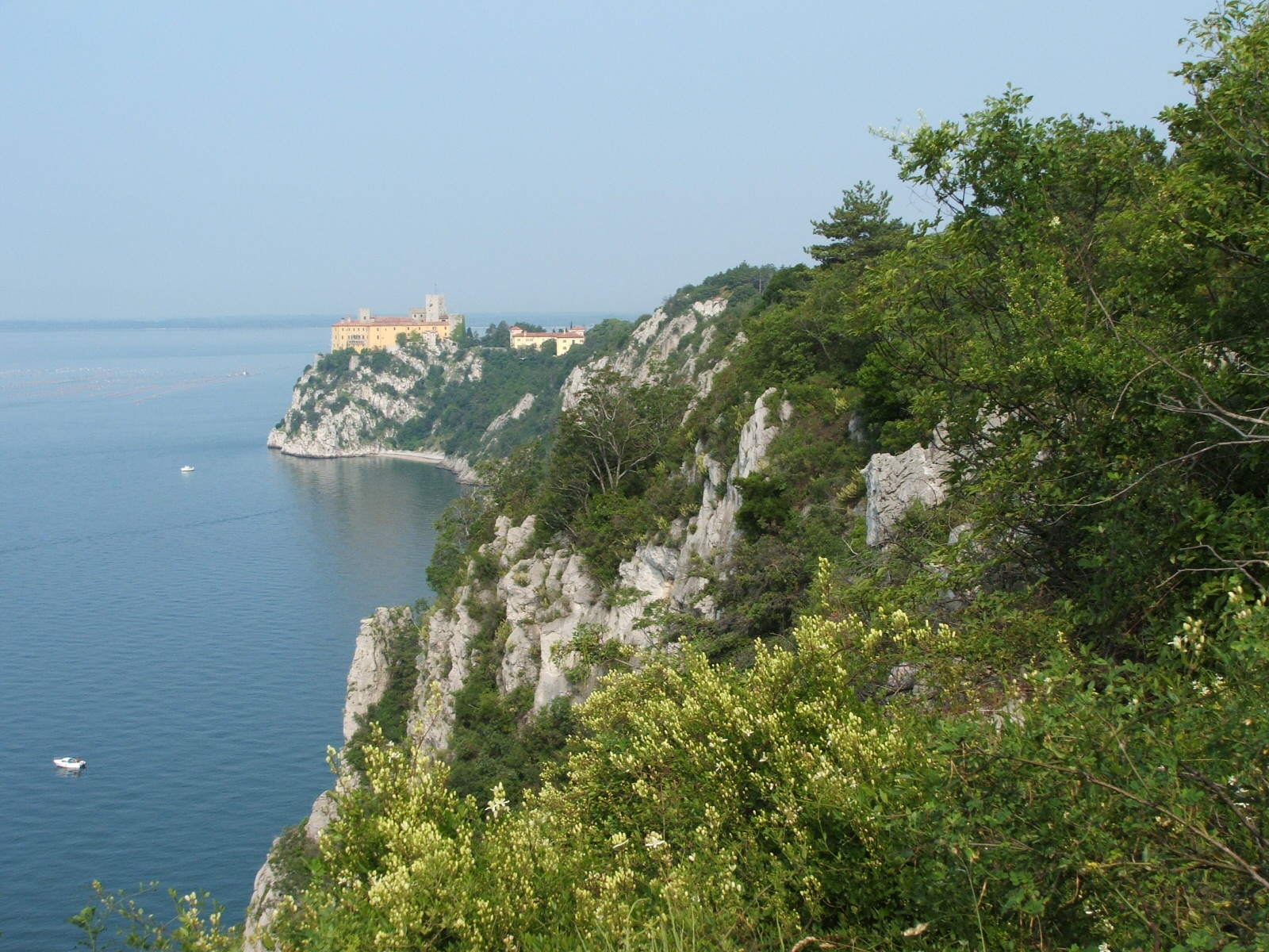 Duino-Aurisina, provincia di Trieste - Riserva naturale delle Falesie di Duino